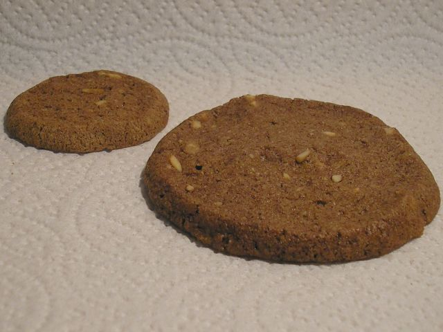 Deldense moppen - traditionele koekjes uit Delden. De grote meet circa 8cm de kleine 5cm.